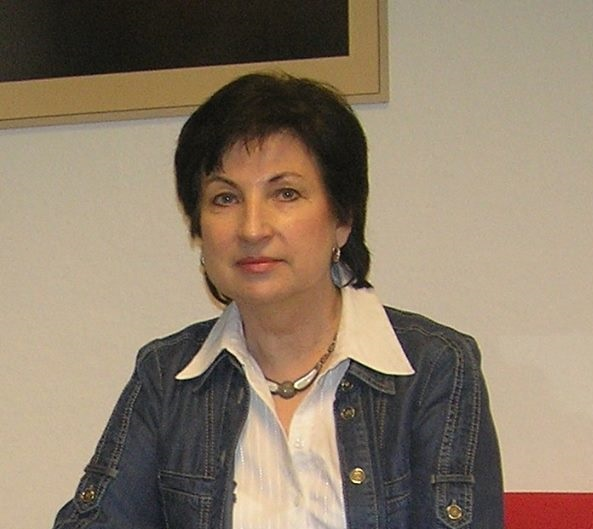 Foto von Lenka Vaňková, Ostrava